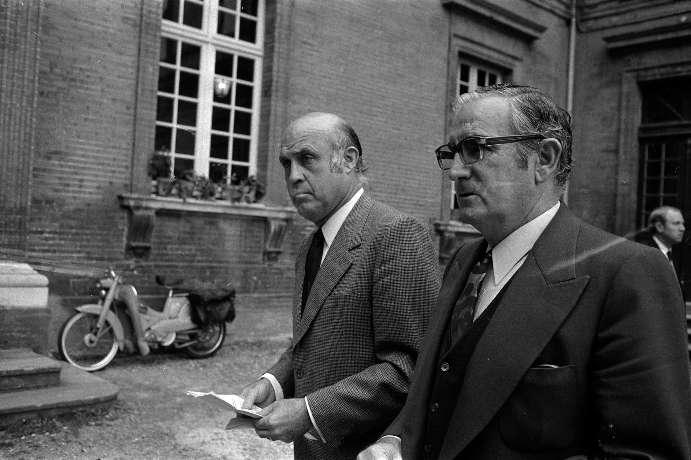 "Max Urbini, Riou, A. Dehaye, commissaire Boutevin". Cour du Palais de Justice. 5 octobre 1971. Plan taille de 3/4 face de Lucien Leduc (entraineur de l'Olympique de Marseille) et de Mario Zatelli (directeur sportif du même club) venus témoigner au procès. Cliché pris lors du procès de René Vignal (ancien footballeur), accusé d'une série de braquages perpétués à Toulouse et dans la région bordelaise entre 1969 et 1970. Observation: Au côté de René Vignal, comparaissaient également MM. Francis Bataille, Roger Claverie, Roger Martin, Marcel Filiol, Jean-Pierre Arrou, Guy Martin, René Doncel et Jean-Louis Parrenin.